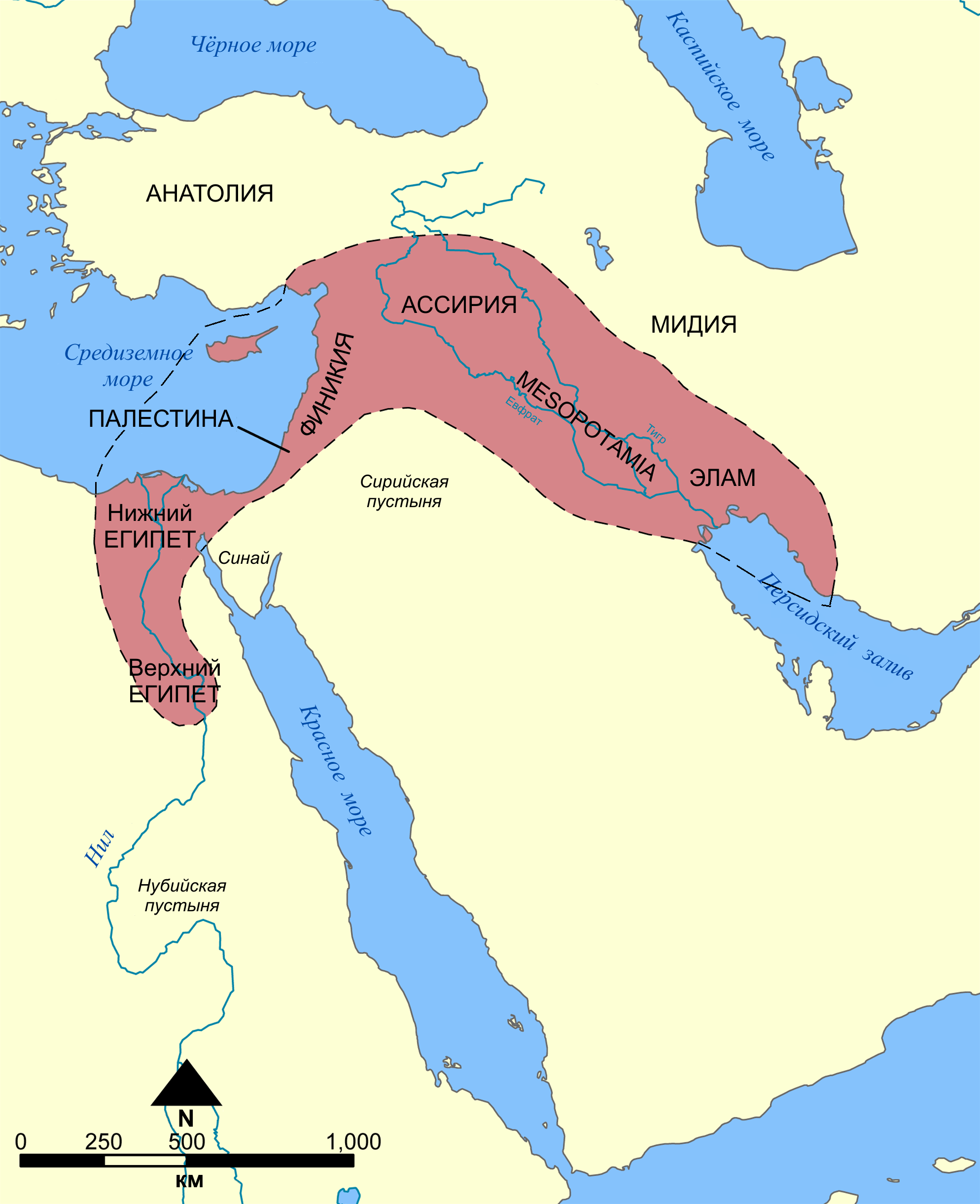 Fertile Crescent rus - Плодородный полумесяц